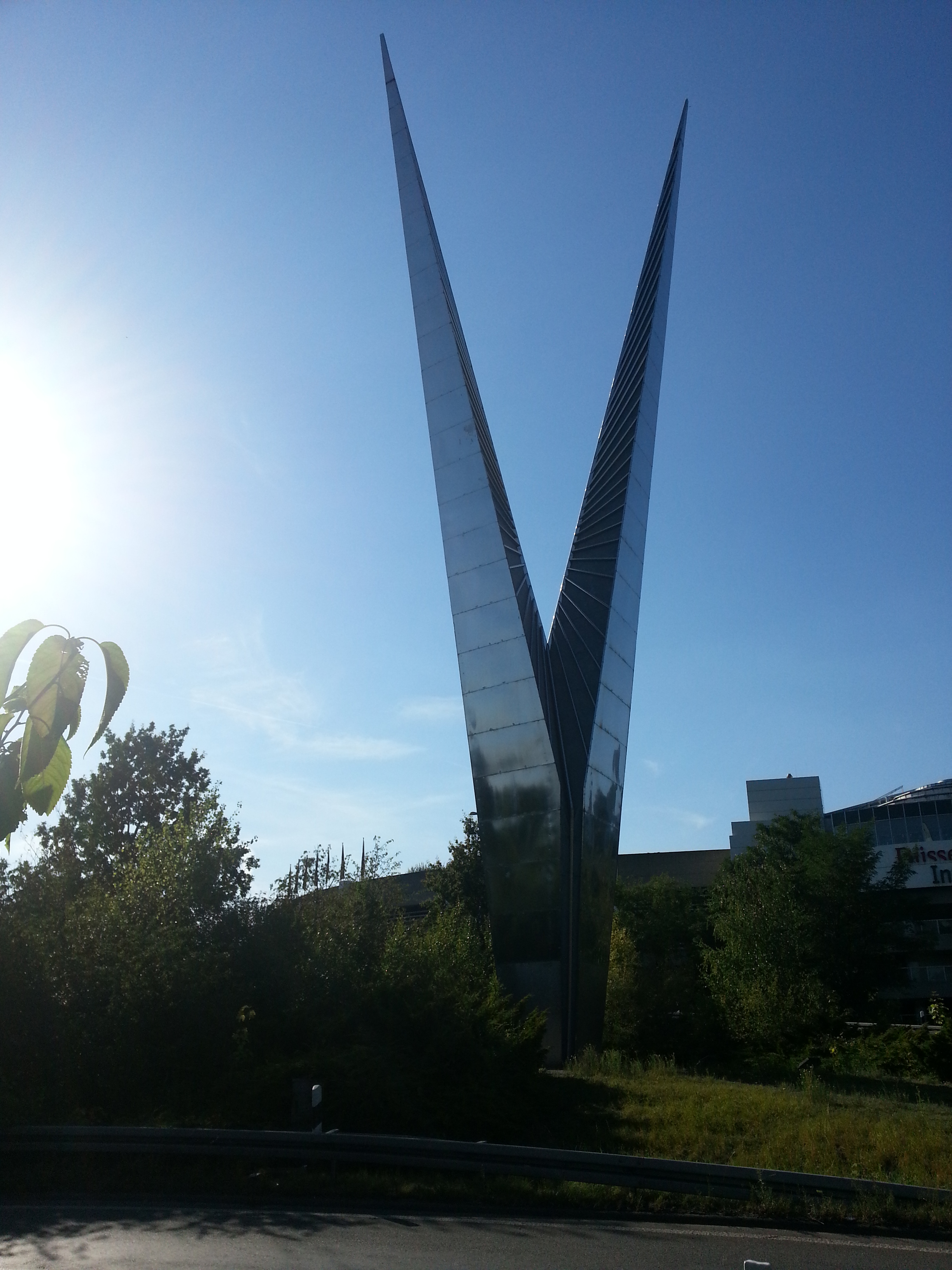 Messezeichen This is a photograph of an architectural monument., no. de-5928014-7(1548)